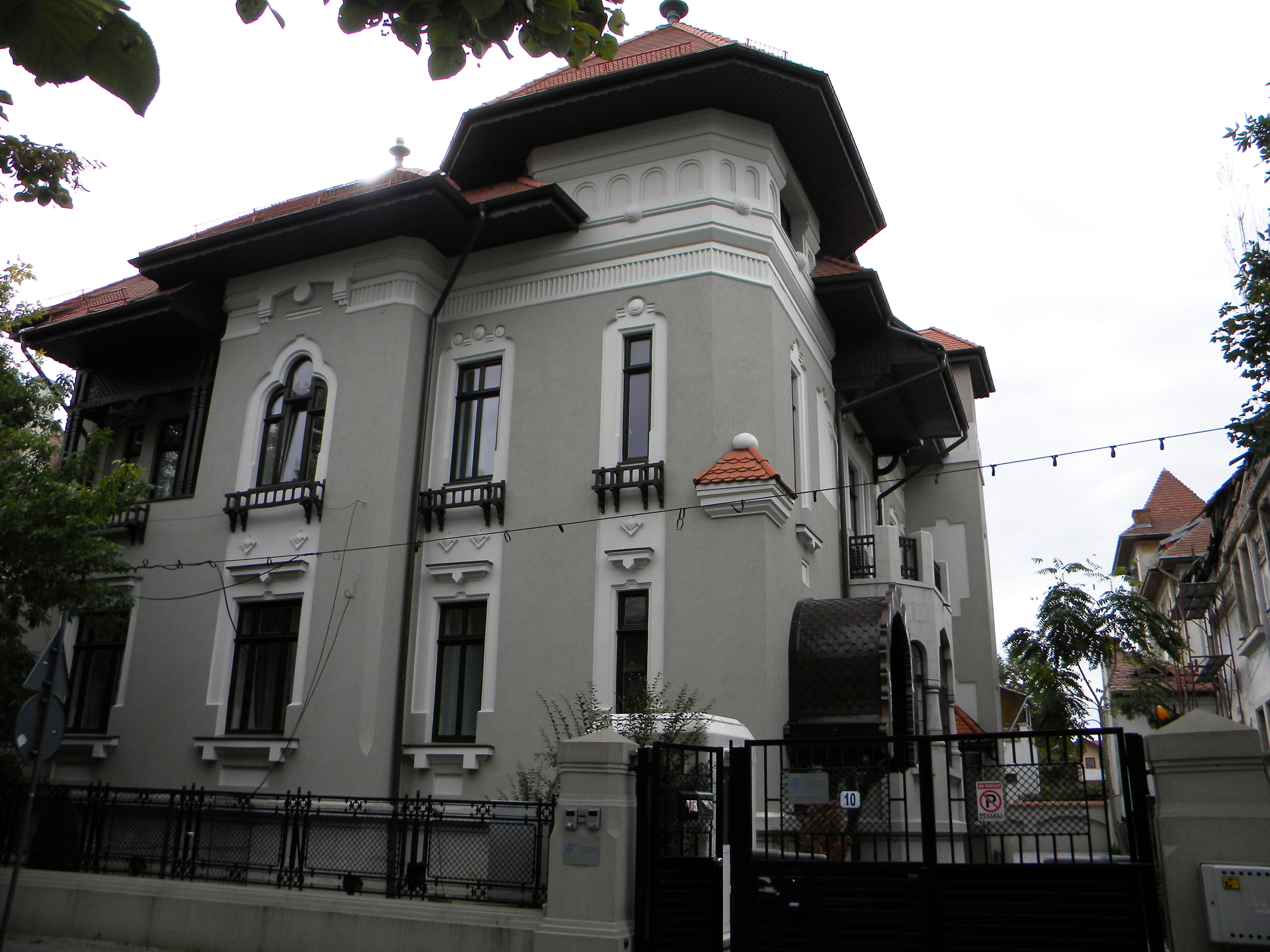 Bucuresti, Romania, Strada Belgrad nr. 10-12 (Casa); B-II-m-B-18123 (6)